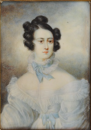 Mme Achille Fould, née Henriette Goldschmidt